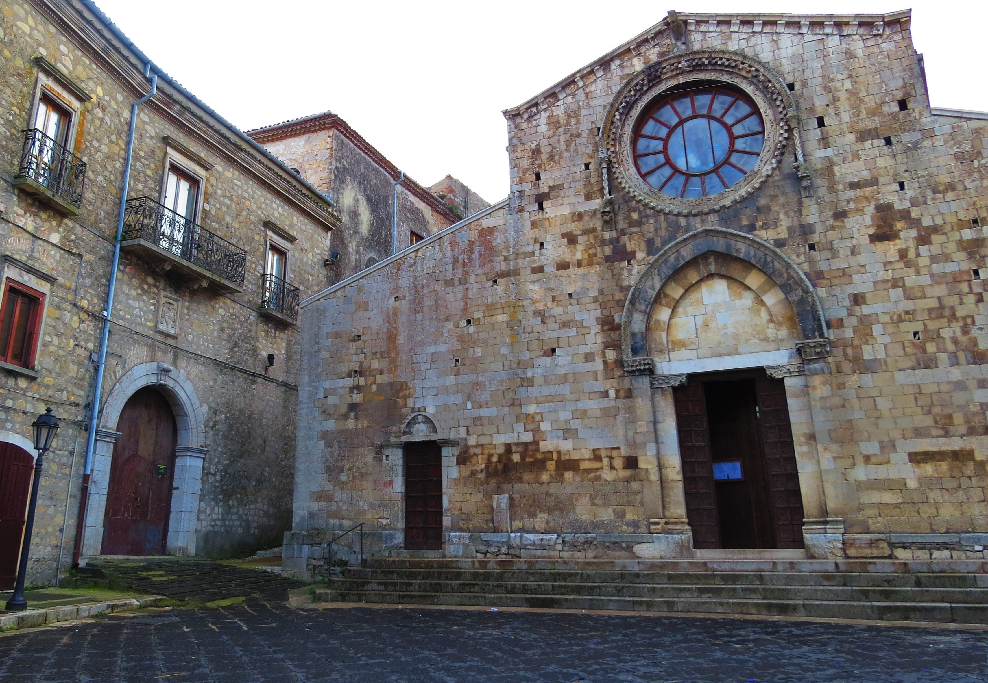 Bovino (FG)